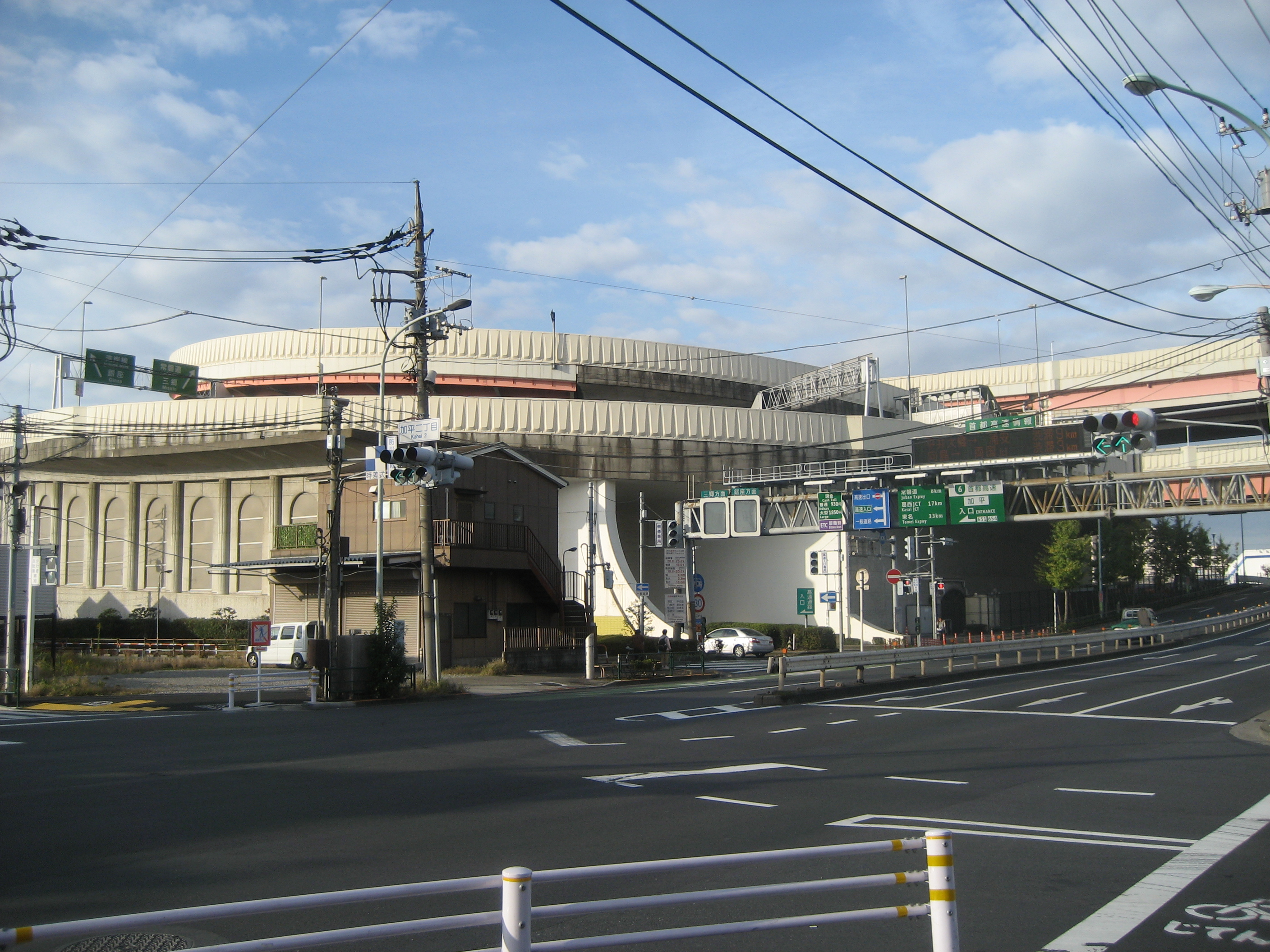 首都高速6号三郷線加平出入口（環七通り加平2丁目交差点付近から撮影）